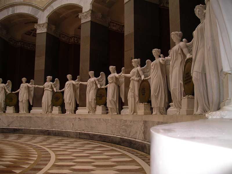 Befreiungshalle Kelheim, Innenansicht mit einem Teil der 34 Siegesgöttinnen von Ludwig Schwanthaler